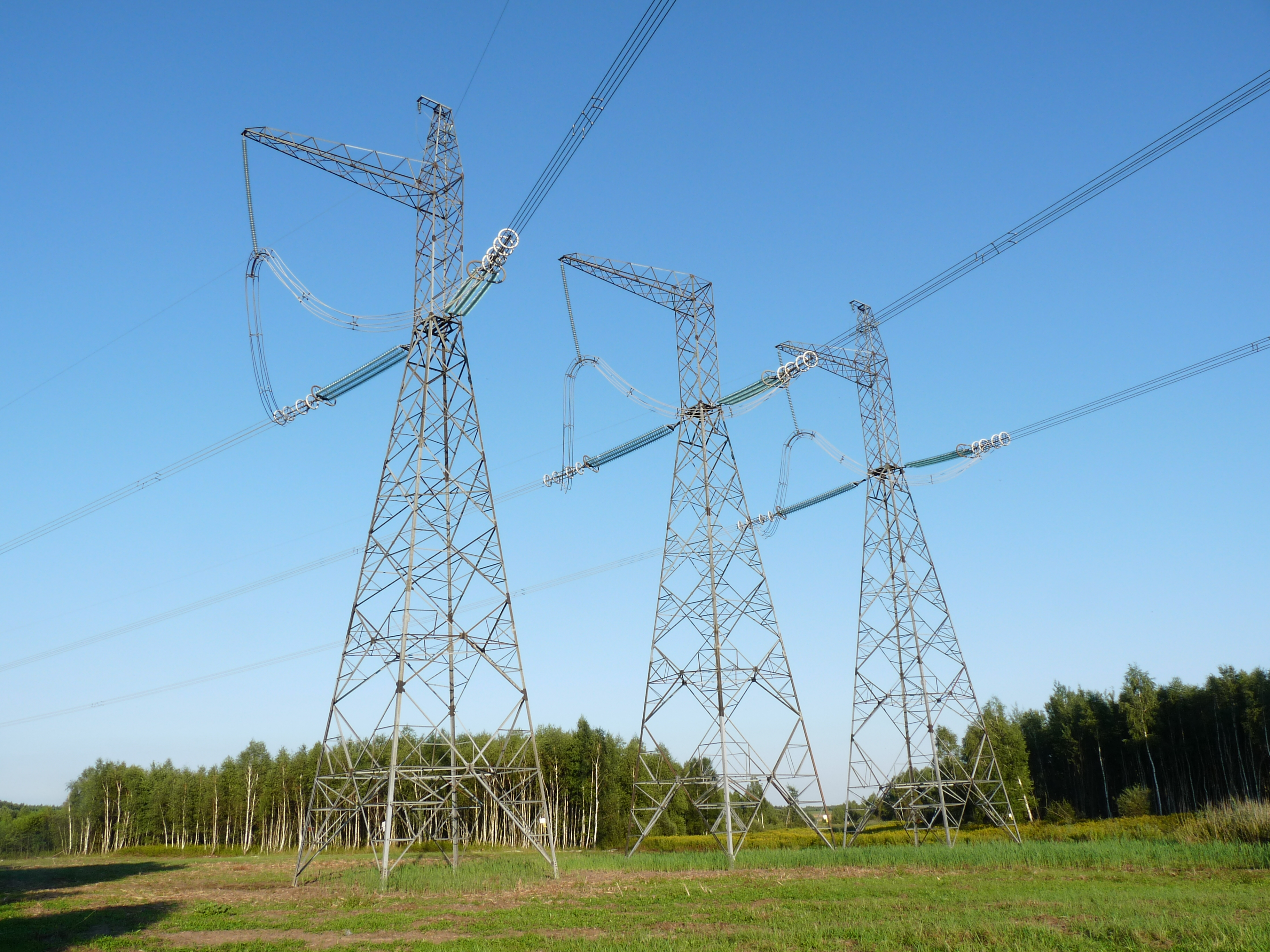 Linia elektroenergetyczna 750 kV Widełka–Chmielnicka: Trzy Słupy narożne linii 750 kV typu U45M3 (osobno na każdą fazę).